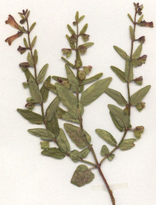 Scutellaria minor, eigener Herbarbeleg